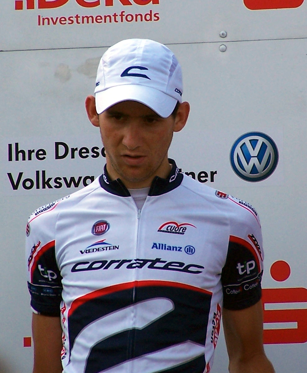 5. Etappe (Dresden–Dresden, 146 km) der Sachsen-Tour 2009, Siegerehrung. Etappenzweiter: Silvère Ackermann